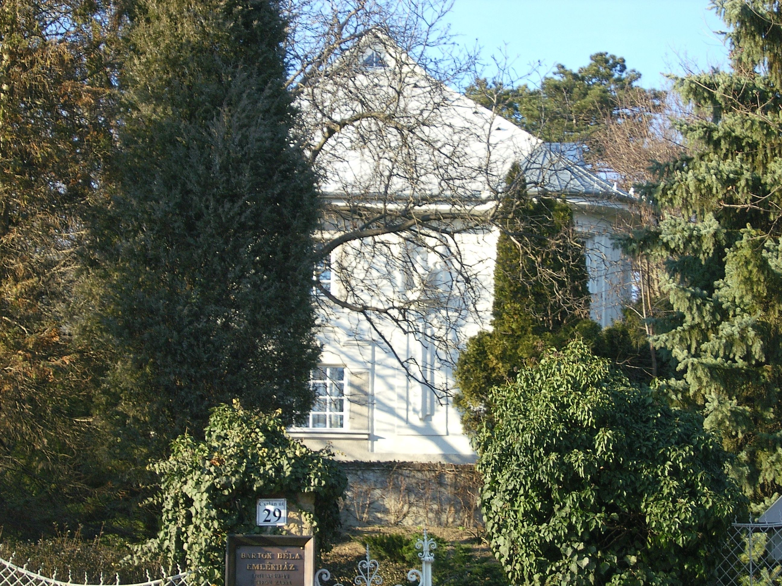 Bartók Béla-emlékház (Pasarét, Budapest II.)